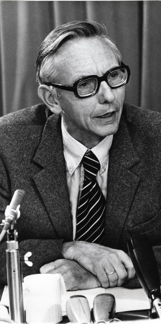 Max van der Stoel (P.v.d.A), minister van Buitenlandse Zaken in het kabinet den Uyl tijdens een persconferentie. Nederland, 30 oktober 1973.